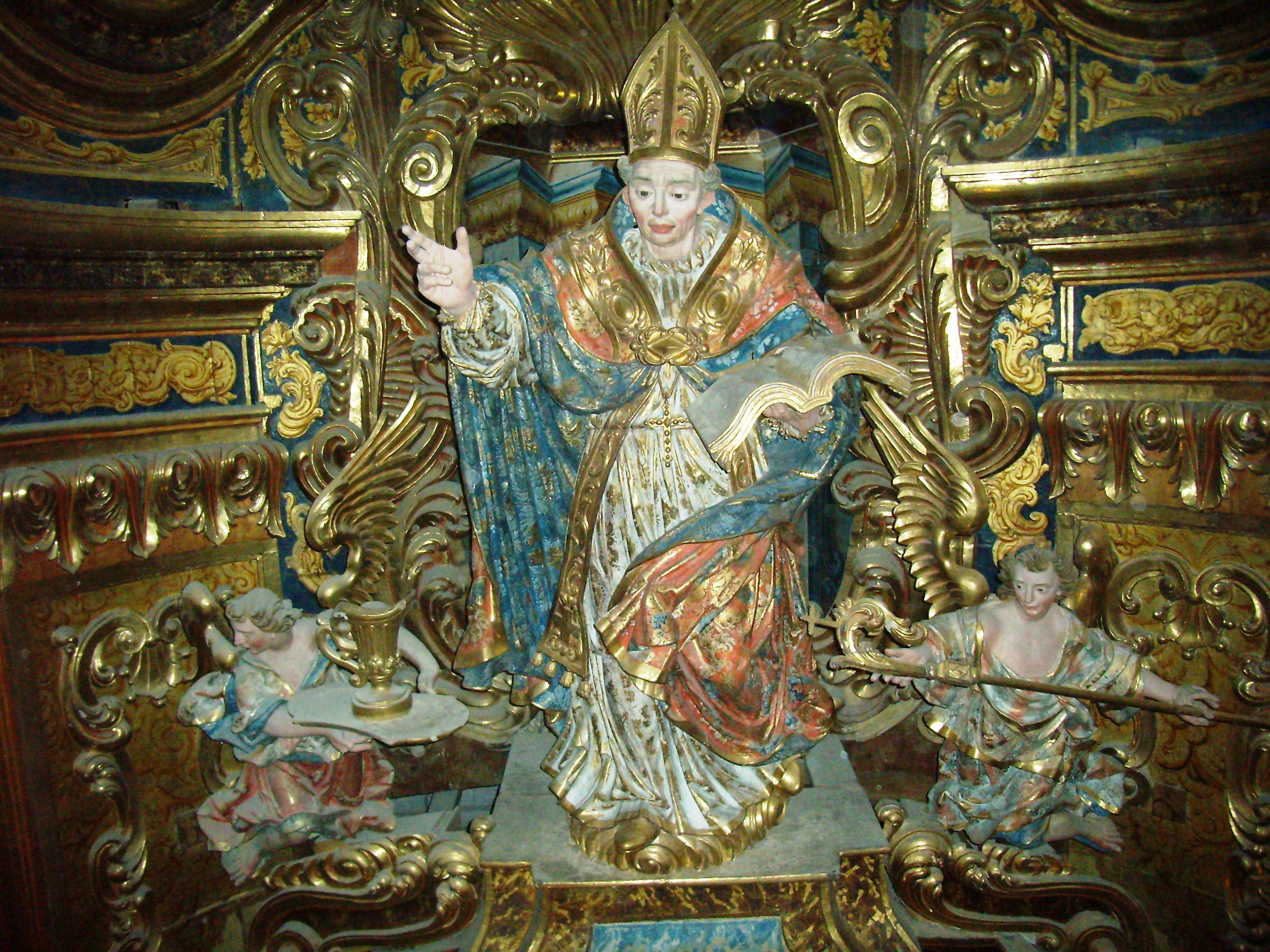 Detall del retaule barroc del Santuari del Miracle de Riner (Solsonès)